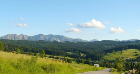 Nowe Bystre – wieś w Polsce położona w województwie małopolskim, w powiecie tatrzańskim, w gminie Poronin. Nowe Bystre usytuwane jest w odległości 2 km od górnej stacji kolejki na Gubałówkę, u podnóża jej północnego stoku, w kotlinie potoku Bystry.